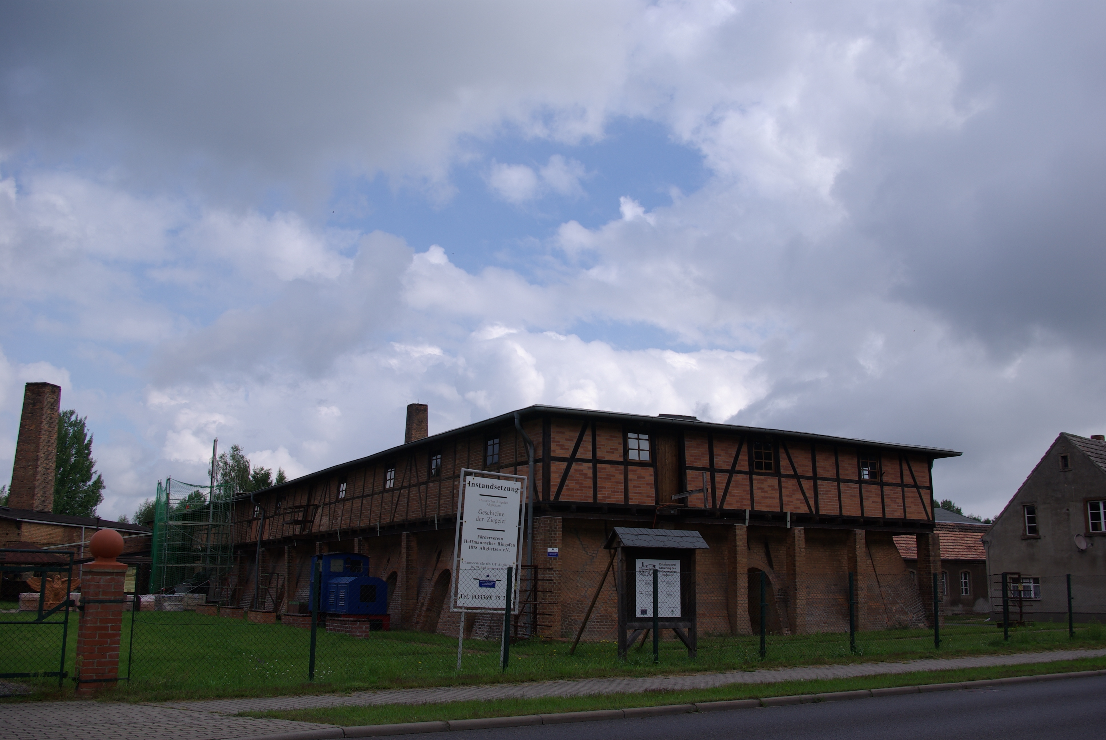 Bad Freienwalde in Brandenburg. Der Ziegelofen im Ortsteil Altglietzen steht unter Denkmalschutz.